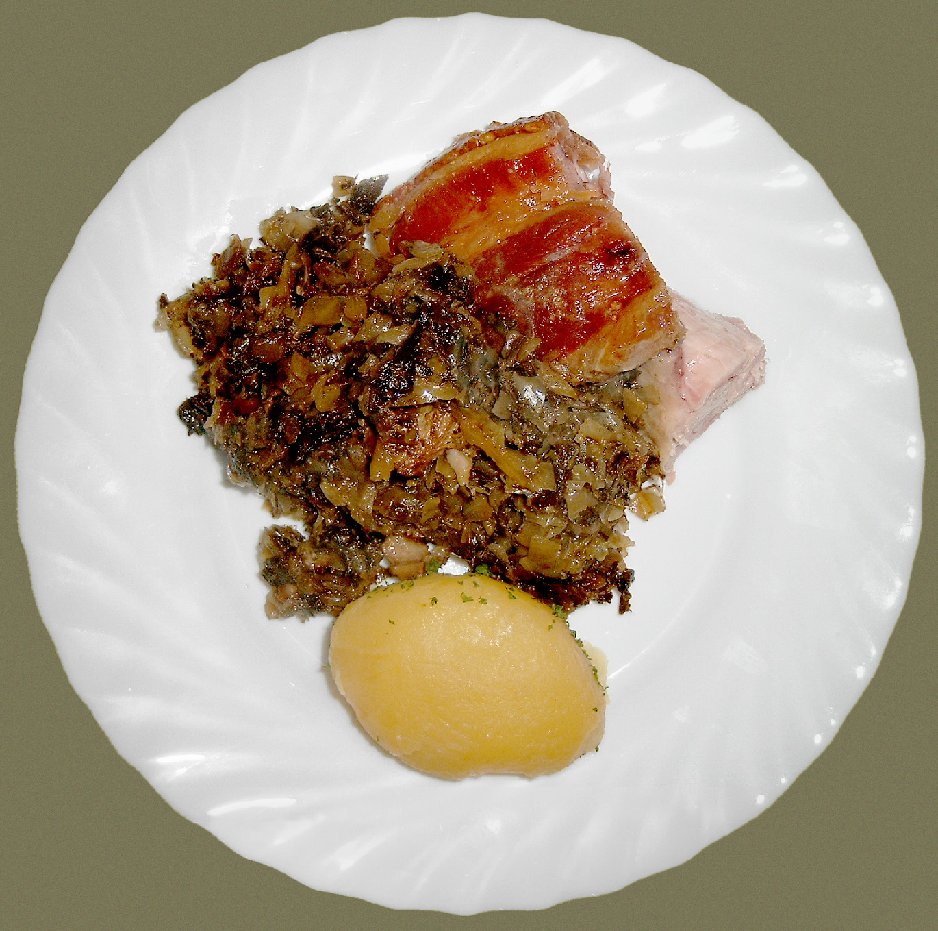 Kleine Portion eines typischen Prignitzer Kniepergerichts mit Kassler und Pellkartoffel